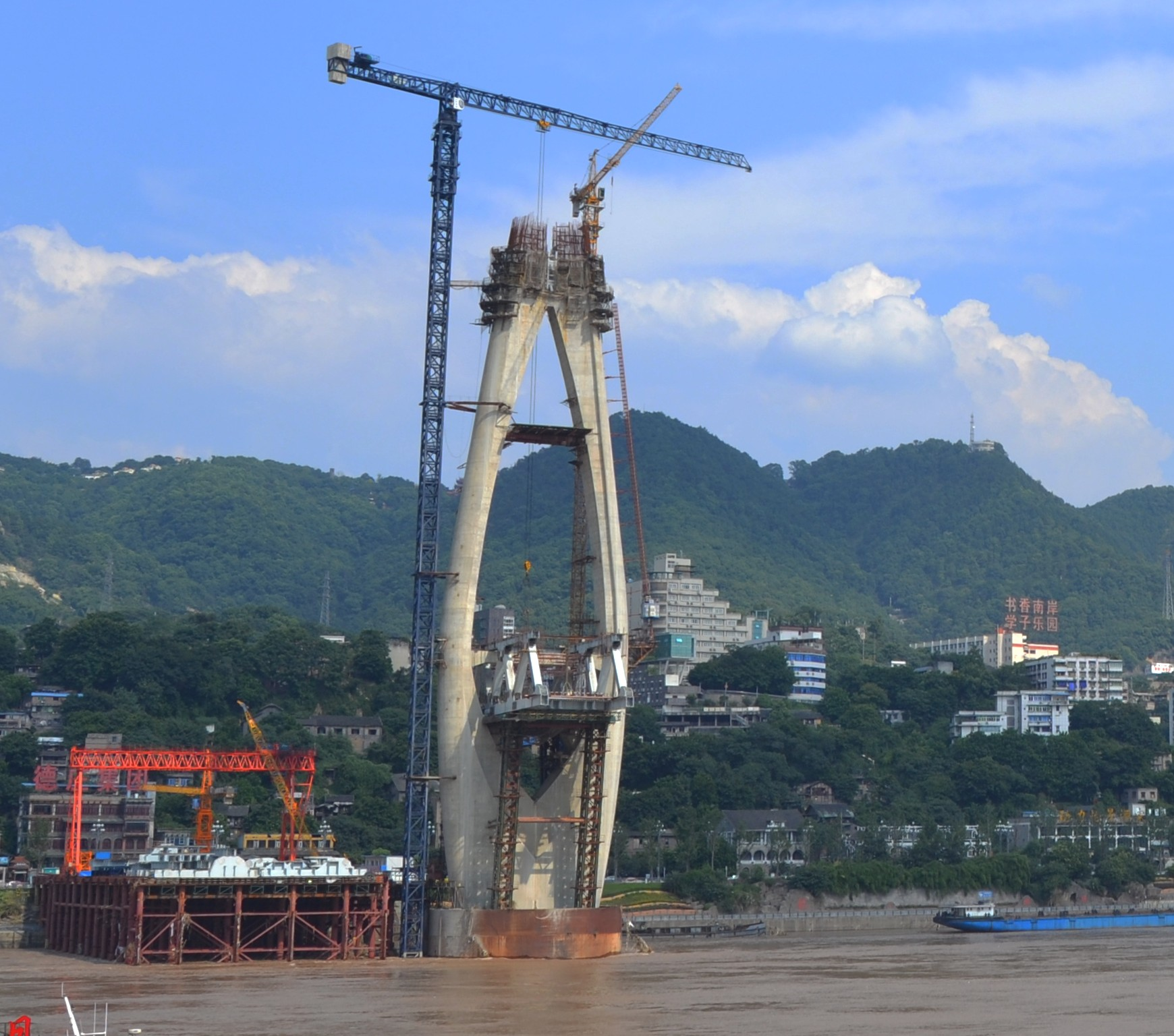 Dongshuimen Yangtze River Bridge